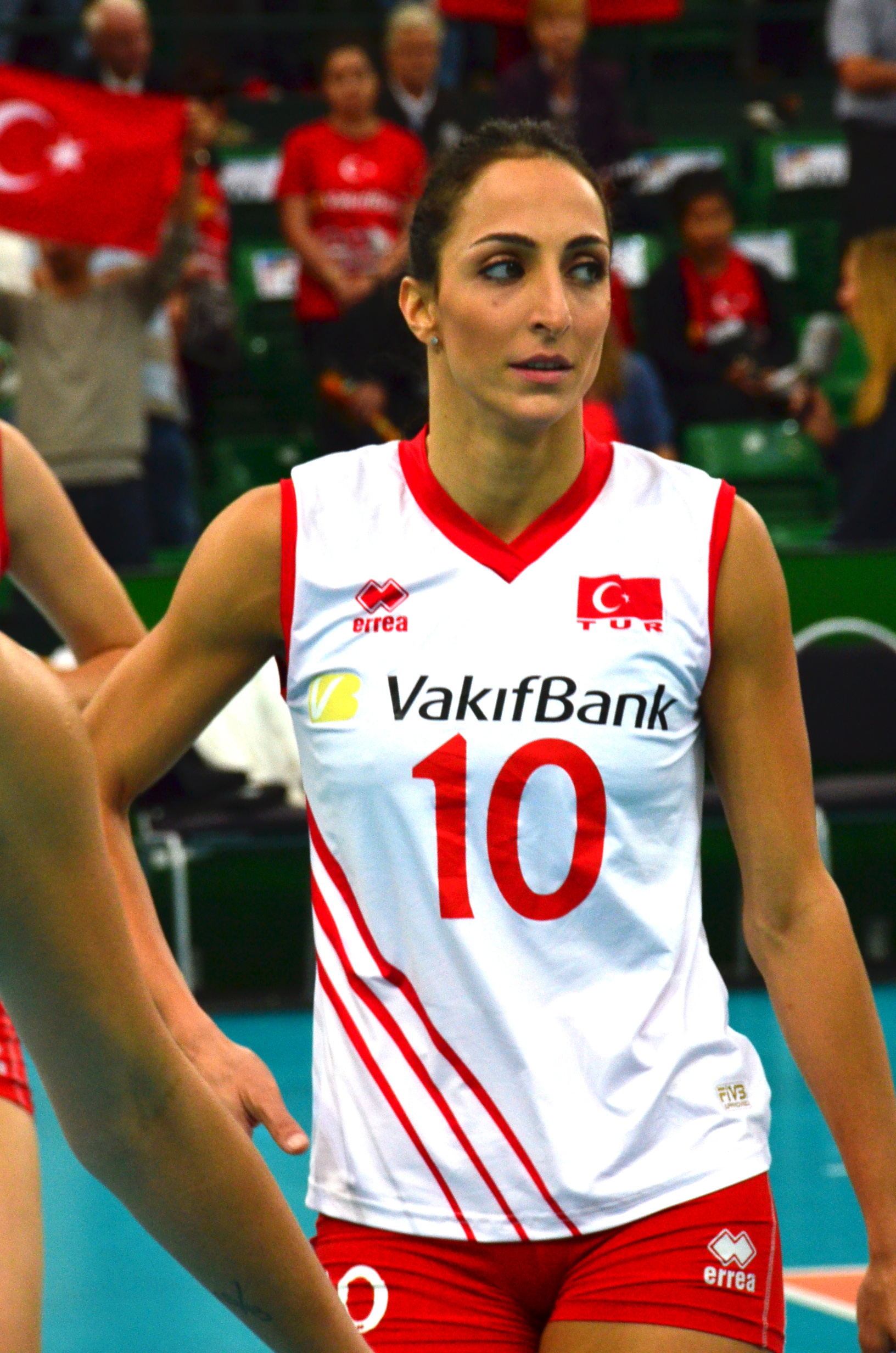 Volleyball-Europameisterschaft der Frauen 2013-Spielort Halle (Westf) Gerry-Weber-Stadion - Spiel 8. September 2013 (Deutschland-Türkei)